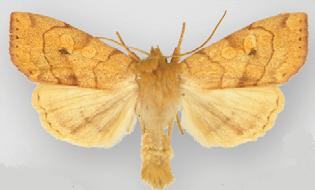 Enargia paleacea male